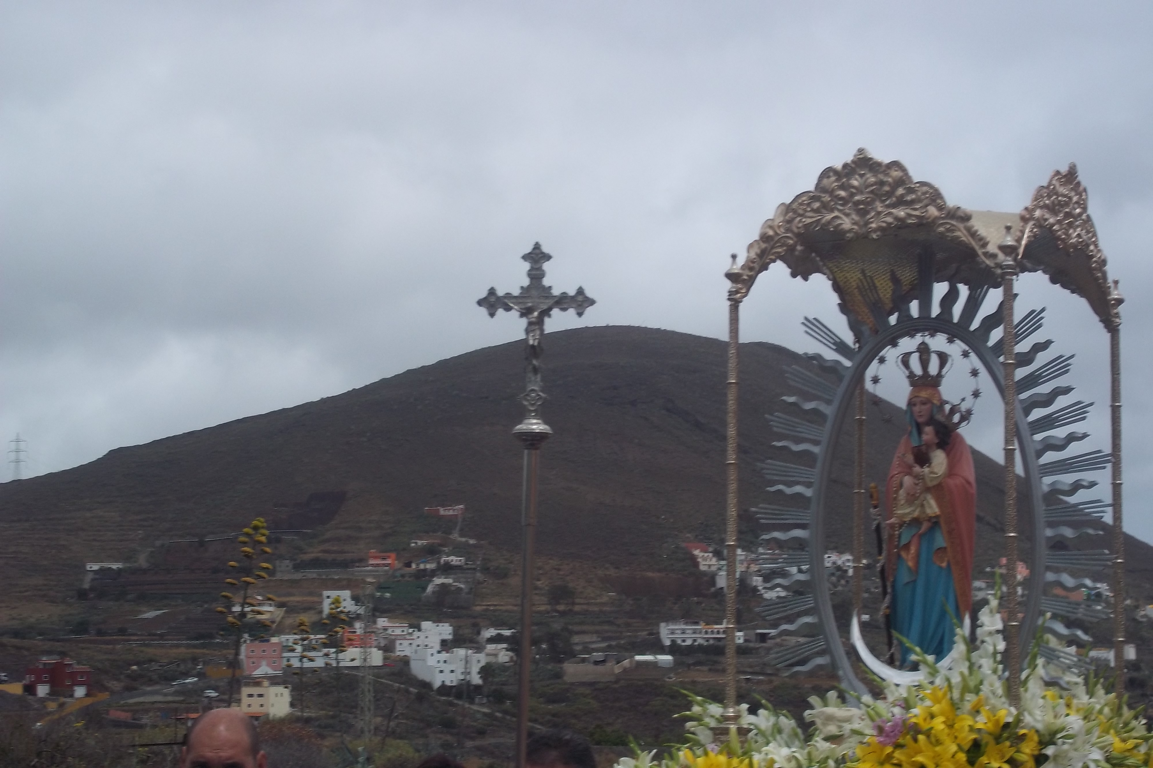 Momento de la procesión de la Virgen de Las Nieves